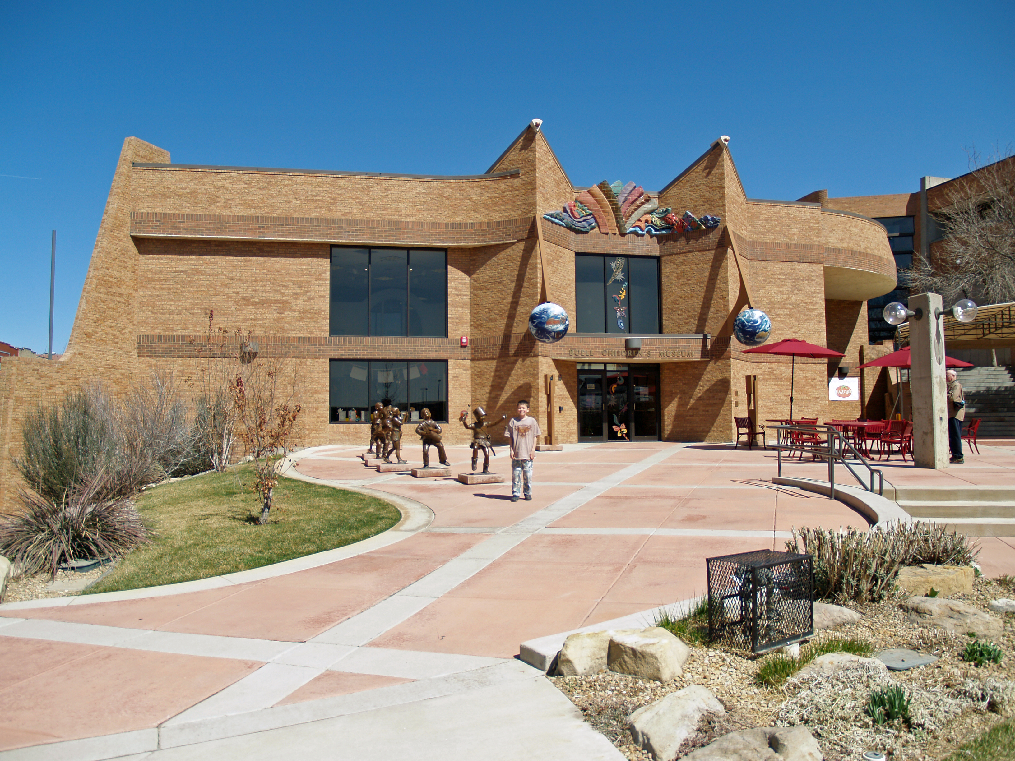 Pueblo's Buell Children's Museum in Colorado.